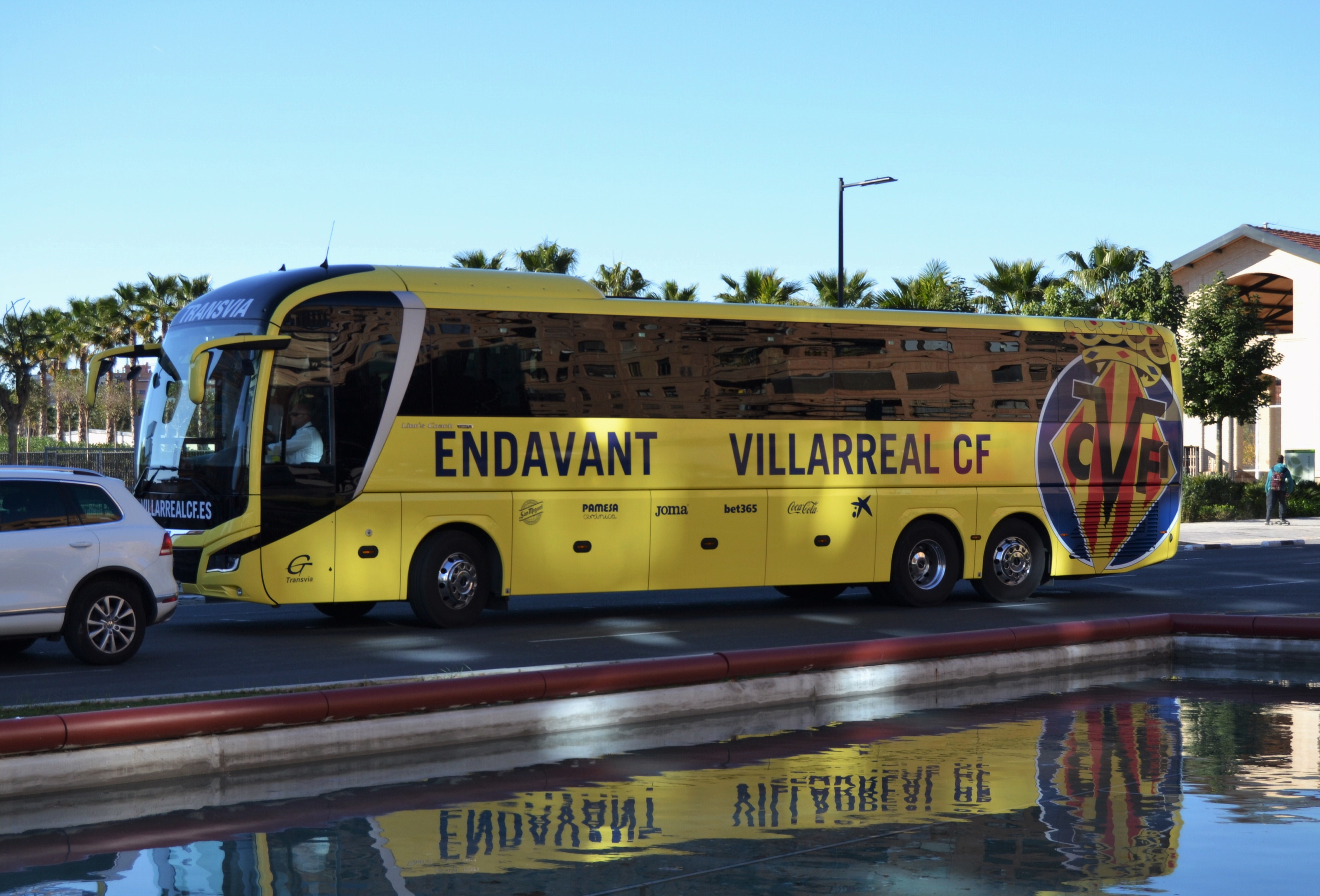 Autobús del Vila-real per la Pantera Rosa, València.